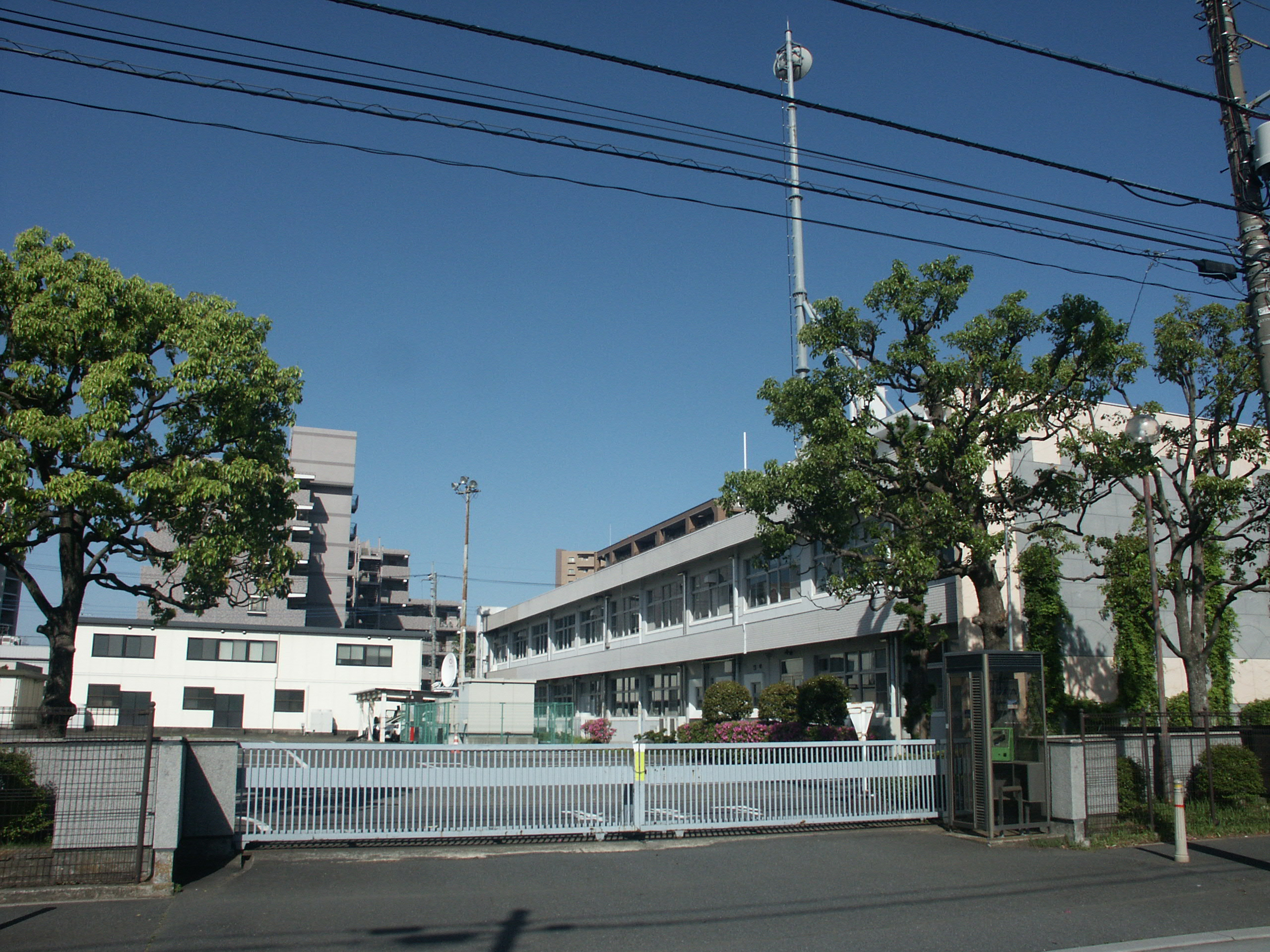 埼玉県さいたま県土整備事務所庁舎（庁舎南側付近から撮影）